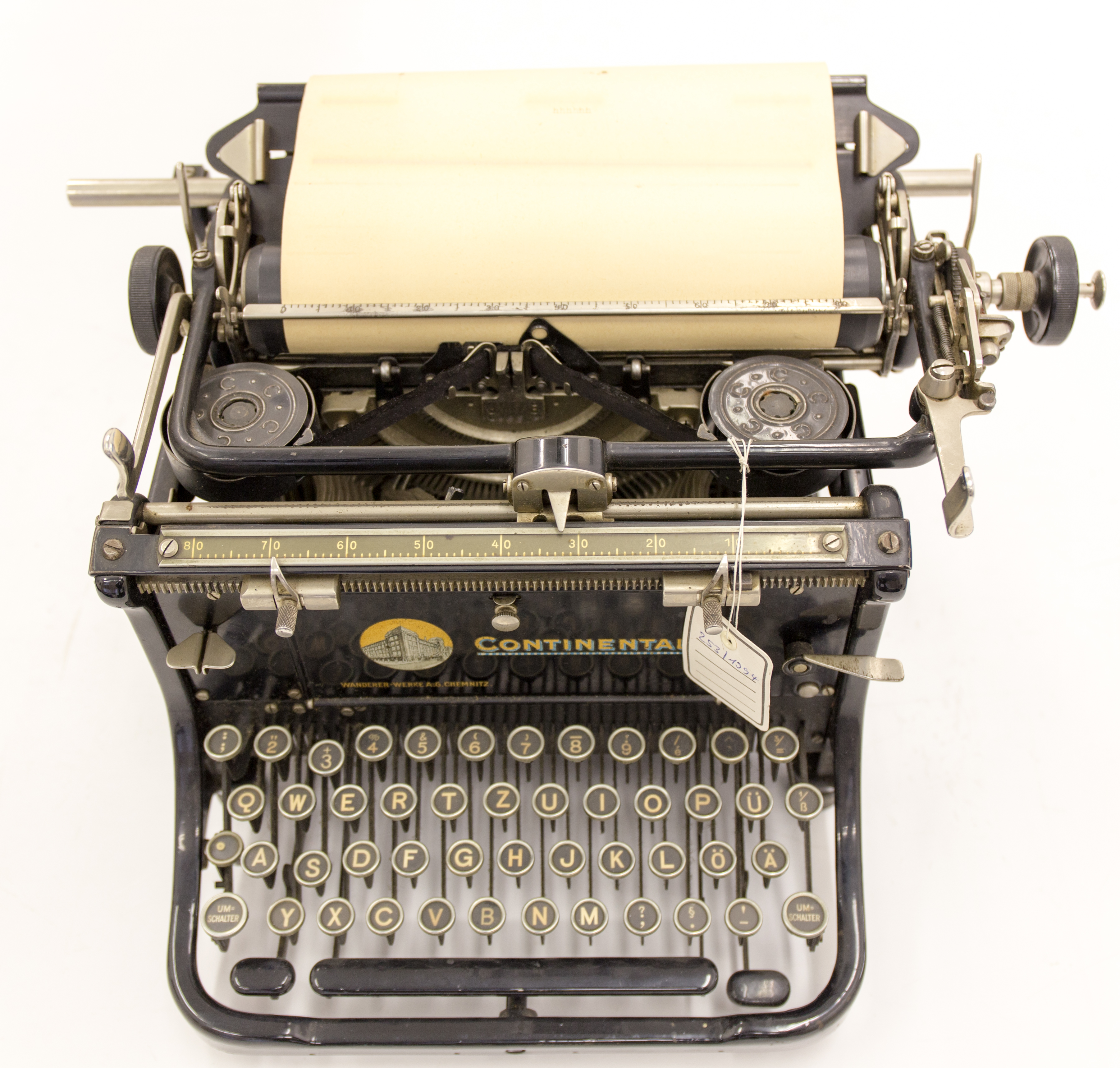 Schreibmaschine Continental Indetifikations-Nr.: N (9 A) 253/1994 Herstellungsort: Chemnitz Hersteller: Wanderer-Werke Höhe x Breite x Tiefe: geschlossen 24,5 x 42 x 35 cm Ausgabe: Metall Beschreibung: Mechanische Schreibmaschine, schwarz lackiertes Metall.Auf der Rückseite ein aufgeklebtes Schildchen: „Ehemals Staatl. Museen Berlin“, Eingezogen ein beschriebener Bogen: „Protokoll der Sitzung des Personalrates der Staatl. Museen 27. 9. 1973“